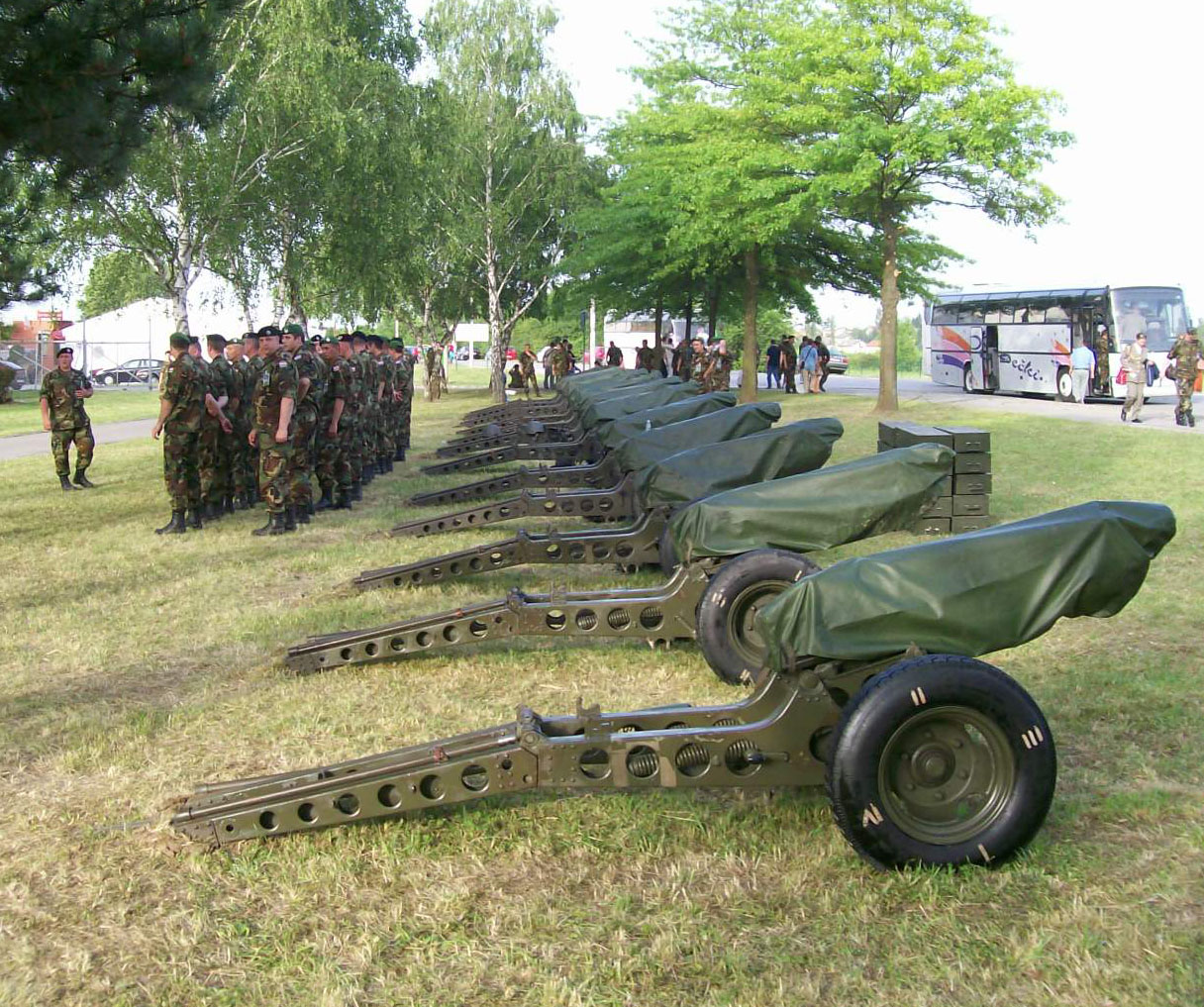 Topnička bitnica u Karlovcu